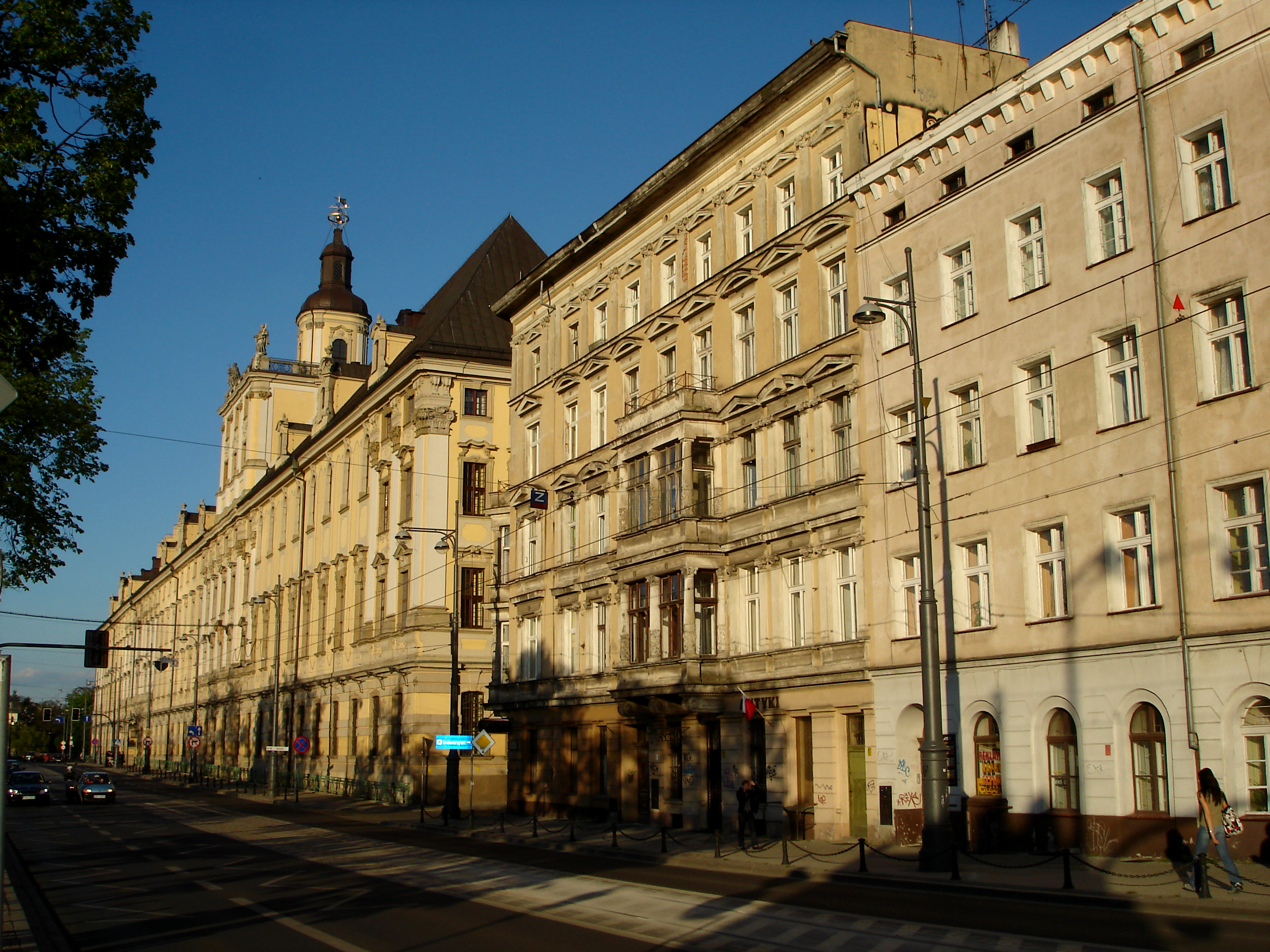 Universität Breslau am Oderufer